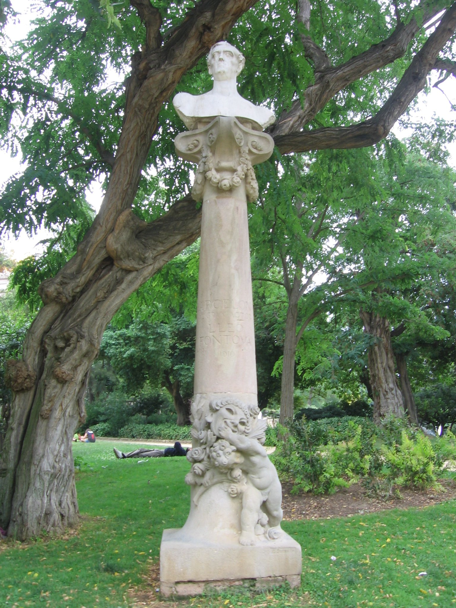 A Lleó Fontova (Pablo Gargallo).